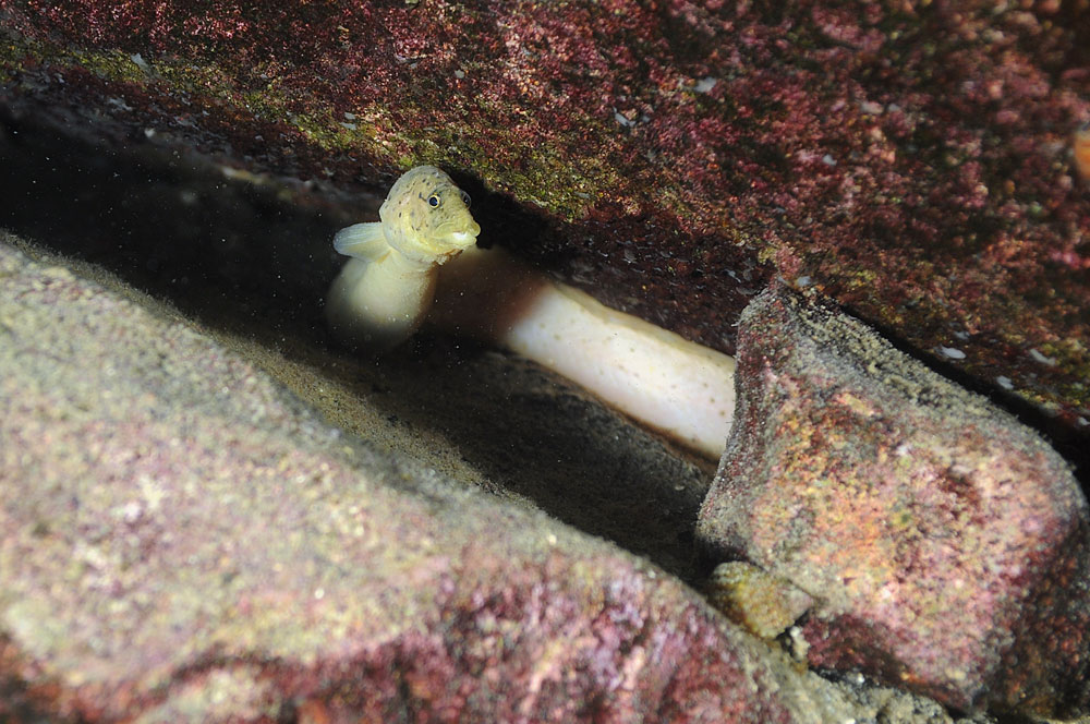 Mastacembelus flavidus photographiée à 40 m. à Molwe (Tanzanie).